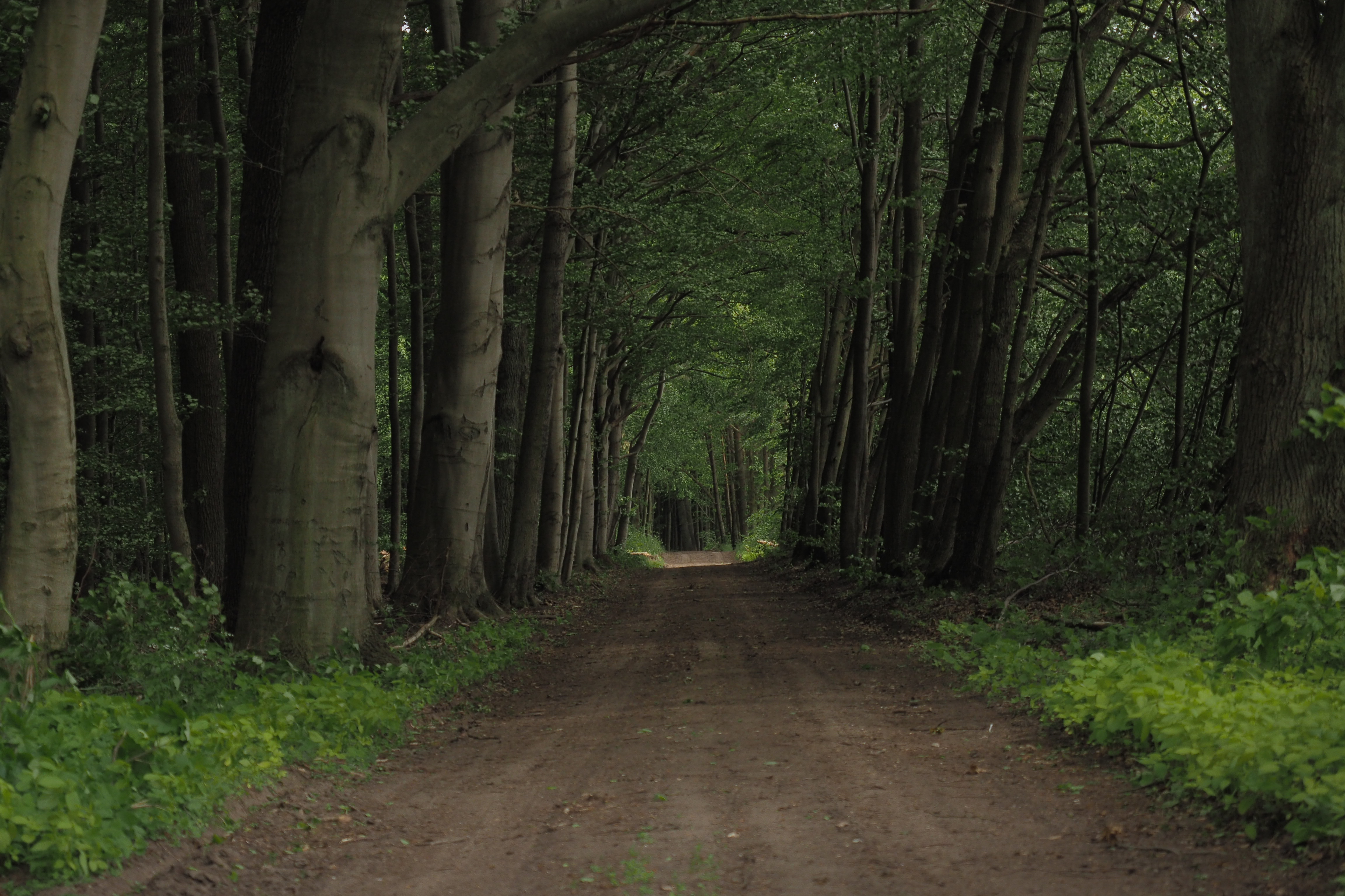 Waldweg durch den Buchenwald im Naturschutzgebiet Buchheide.